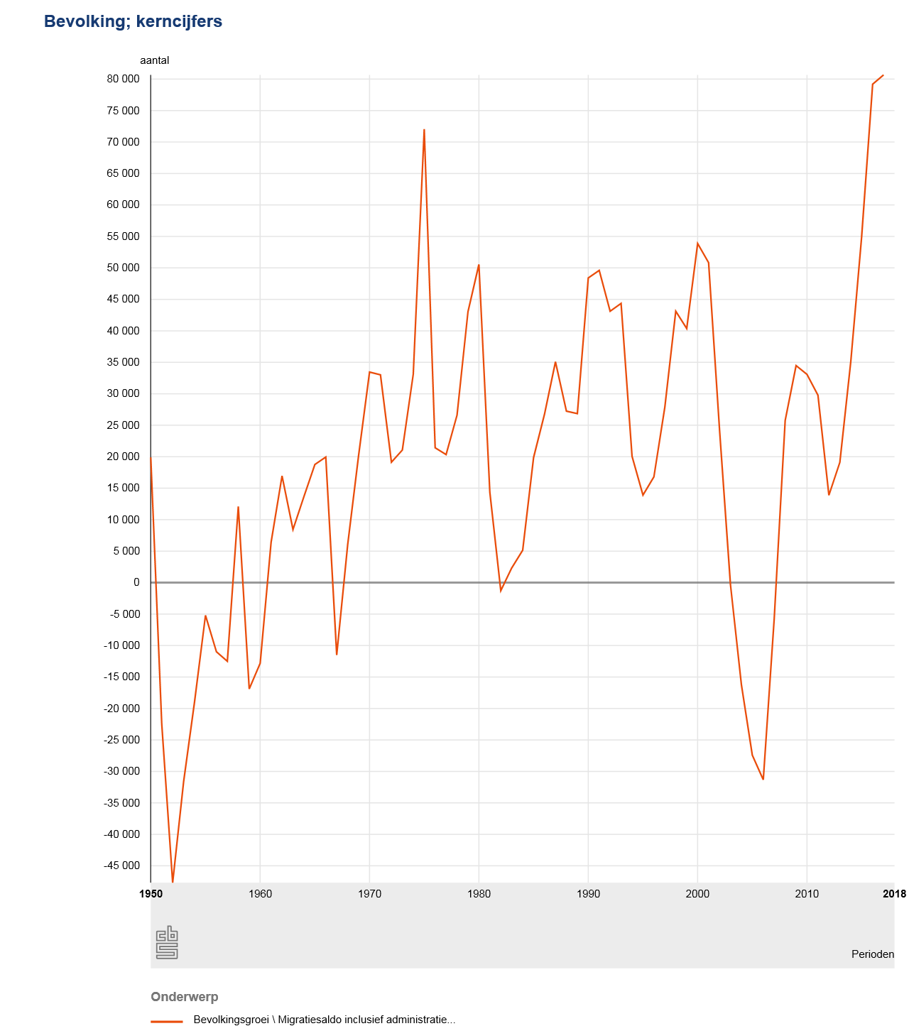 Migratiesaldo vanaf 1950